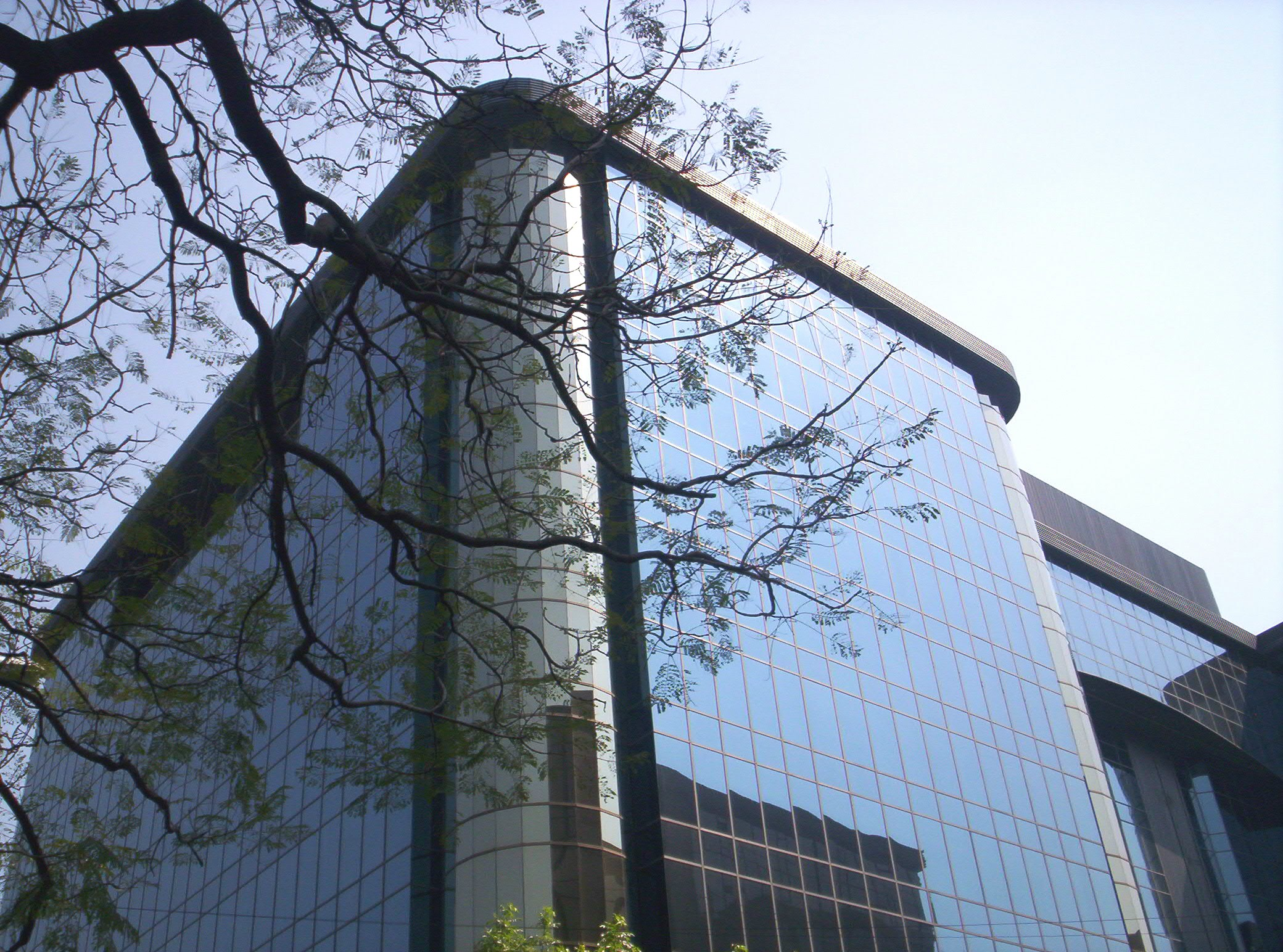 Vista lateral del Edificio corporativo de Kimberly